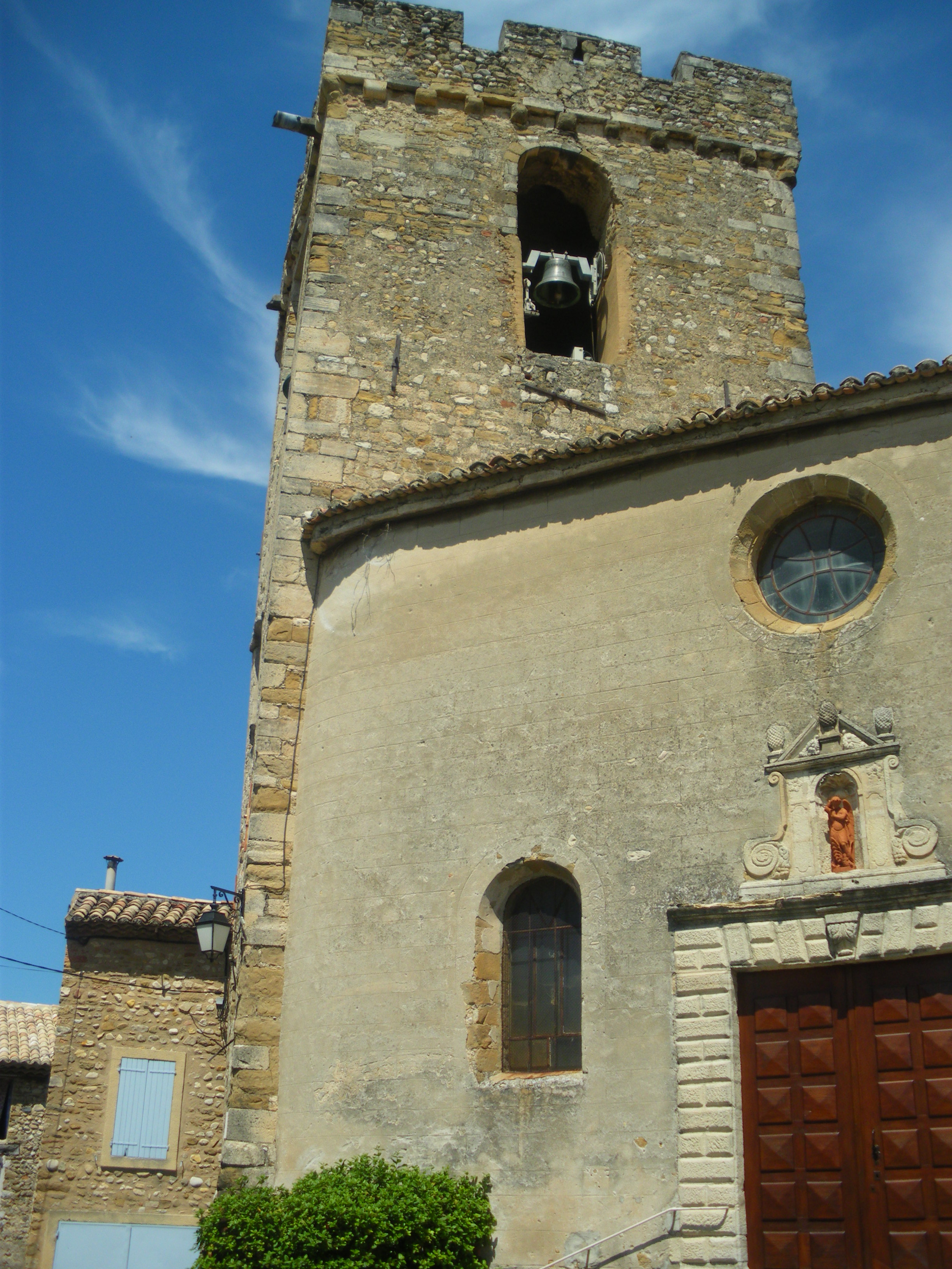 église de Villedieu, Vaucluse